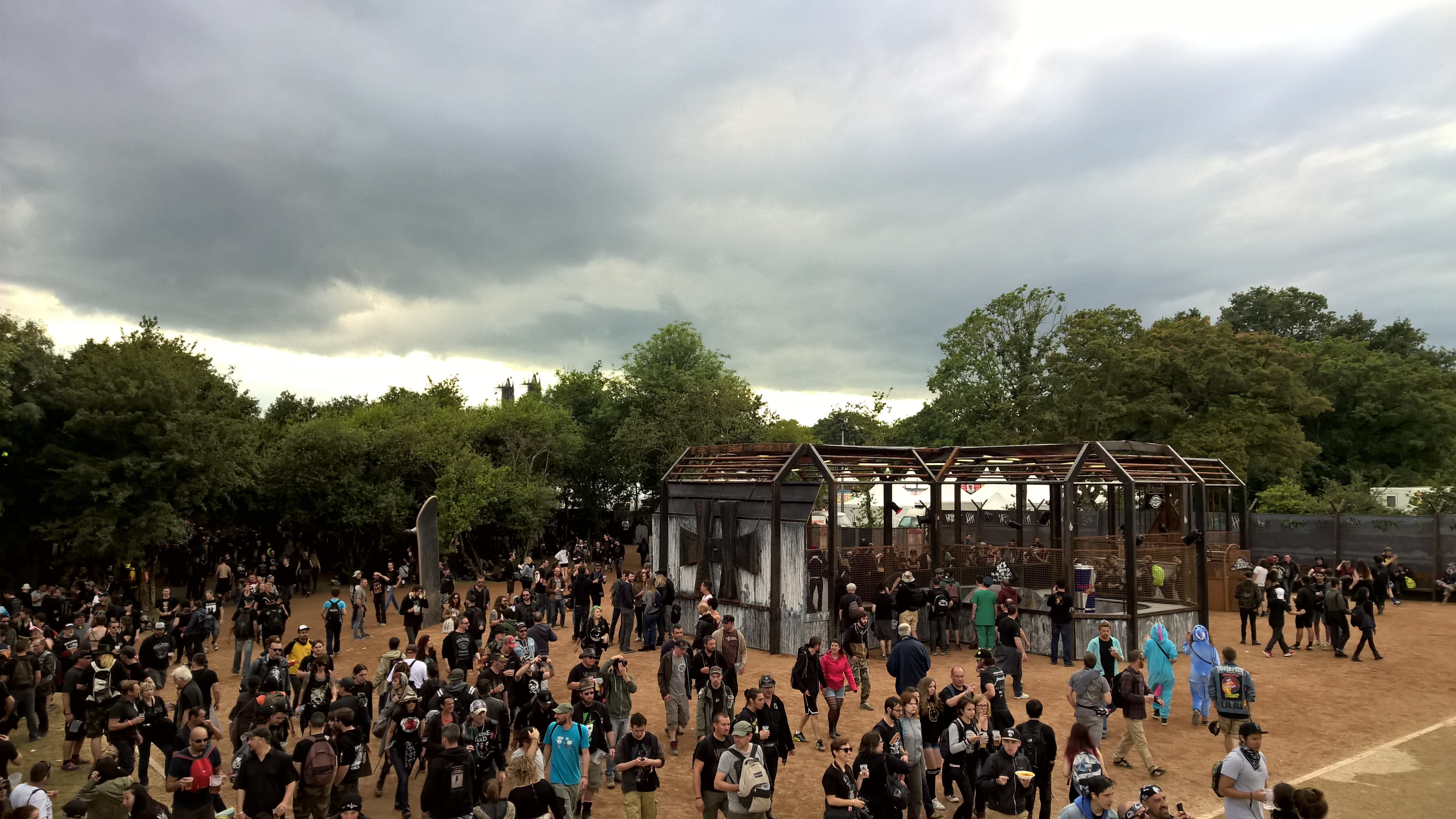 Le skatepark "Cross da Cruzz", Hellfest 2016.